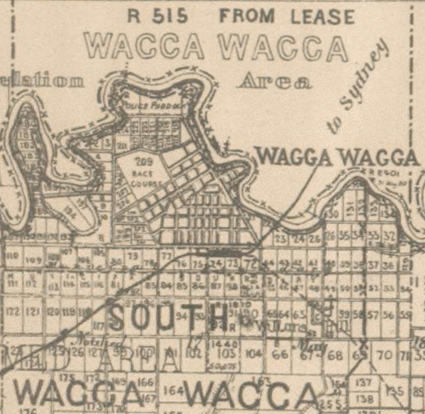 Wagga Wagga in 1897